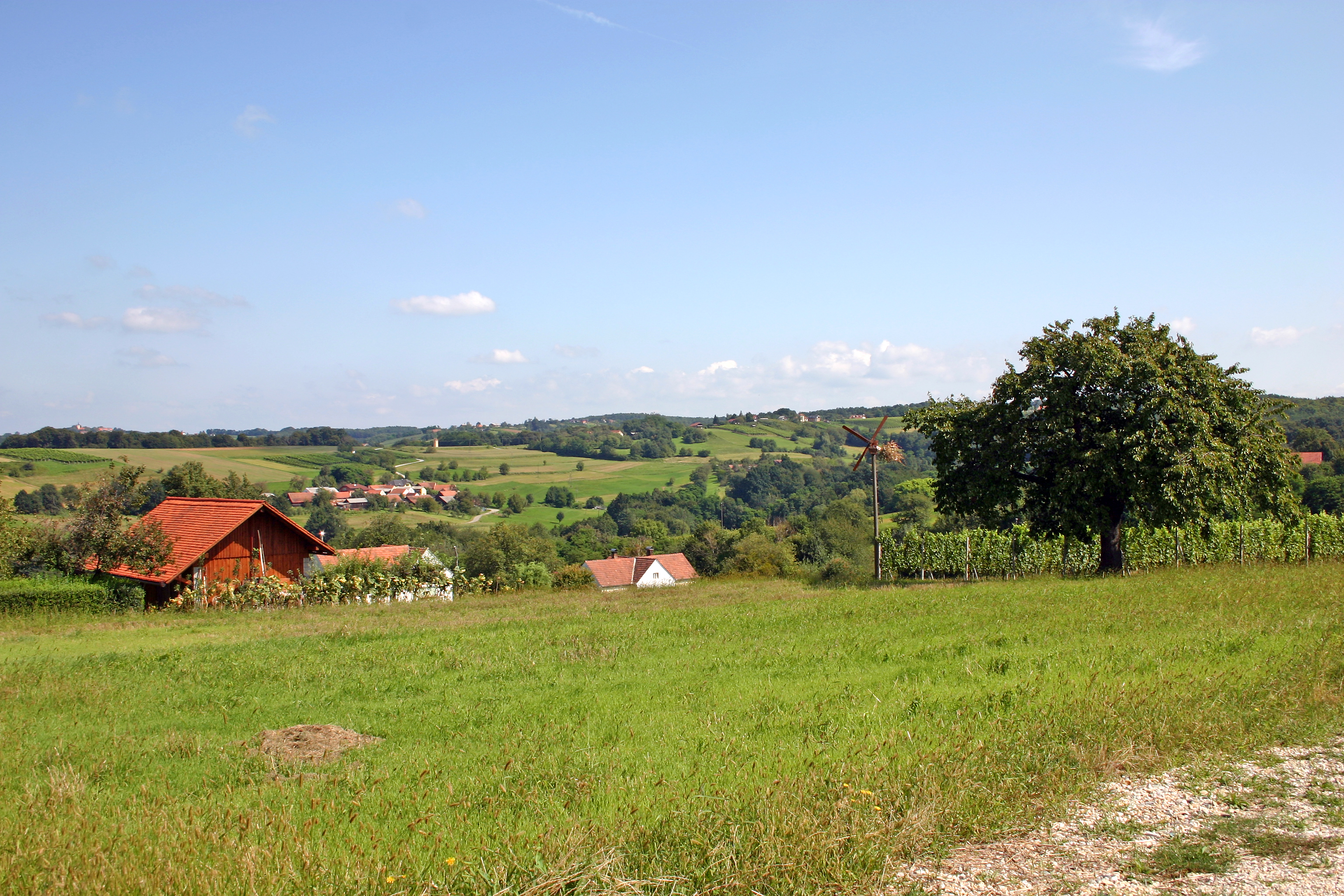 Panoramska slika, Adrijanci. Panoramic picture, Adrijanci. Panoramabild, Adrijanci.